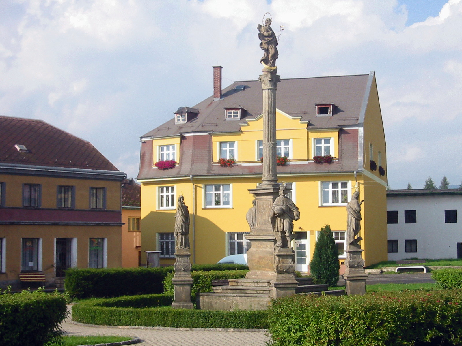 Mariánský sloup ze 20. let 18. století na náměstí v Osečné, okres Liberec